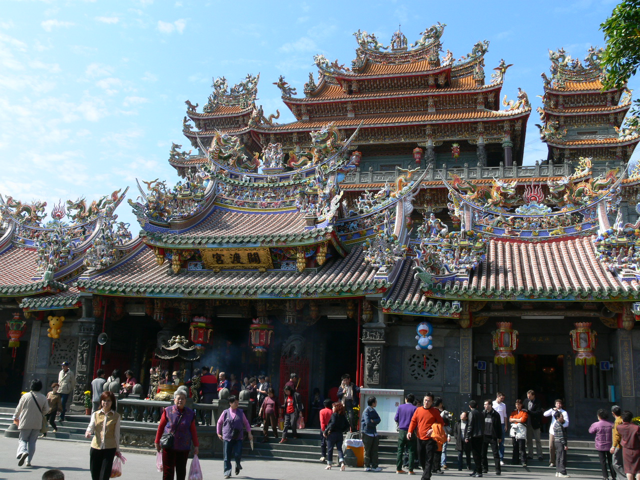 GuanDu Temple, Taipei, Taiwan 台灣台北市 關渡宮 Feb. 06, 2006